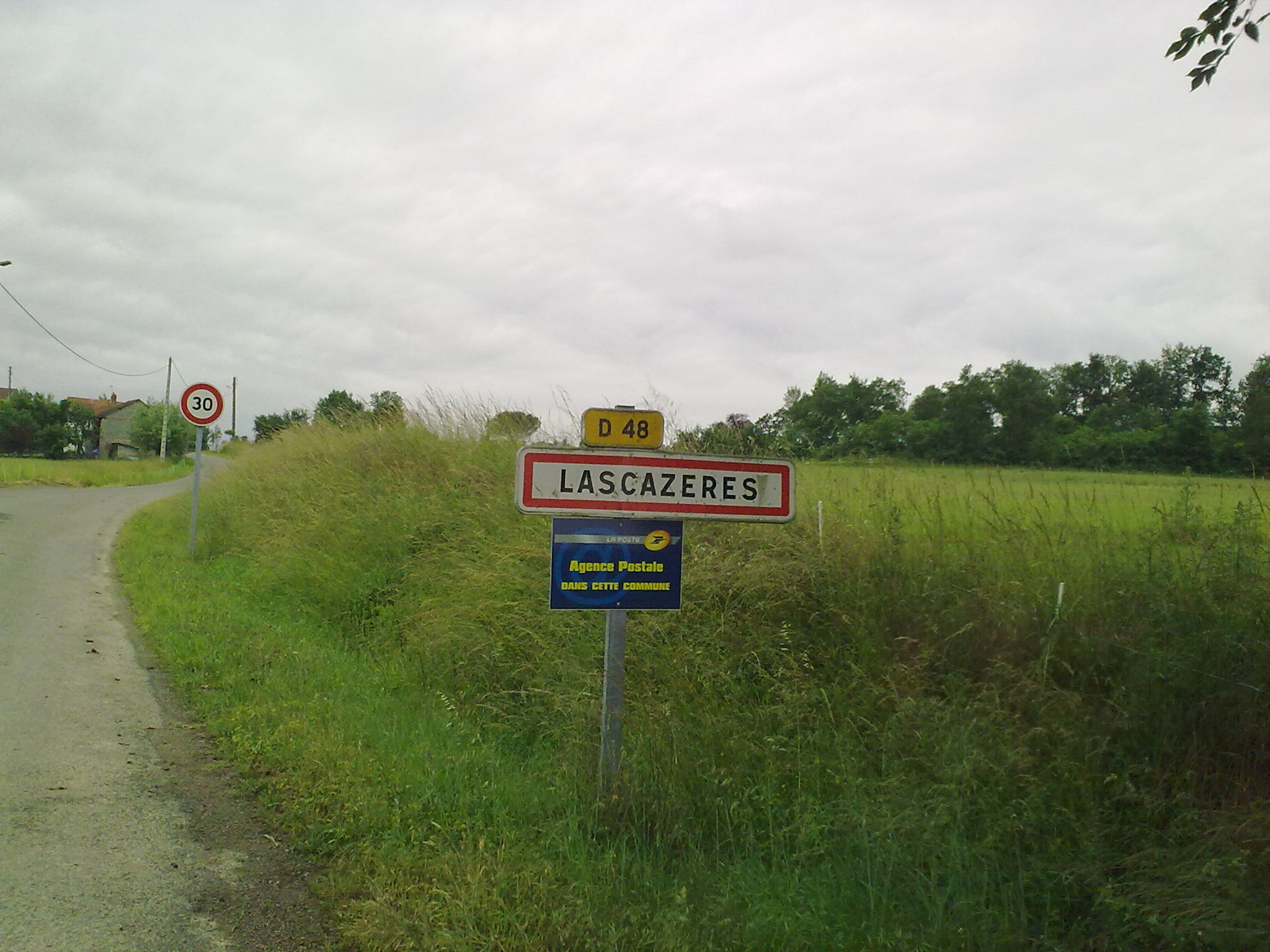 Lascazères